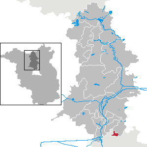 Glienicke/Nordbahn in Brandenburg (Country) - District Oberhavel